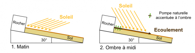 Frédéric Schmidt